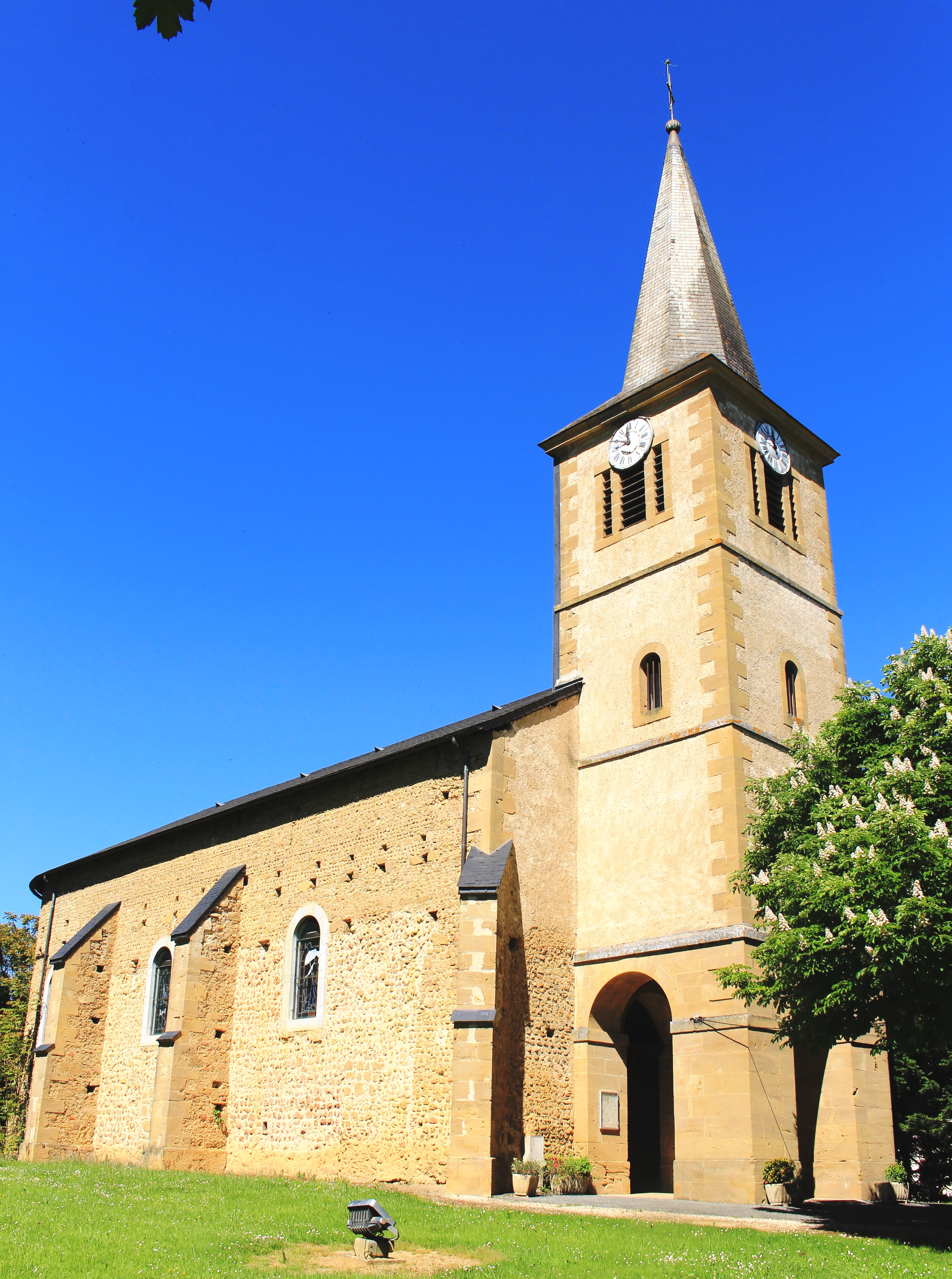 Église de l’Assomption Bernadets-Debat (Hautes-Pyrénées)